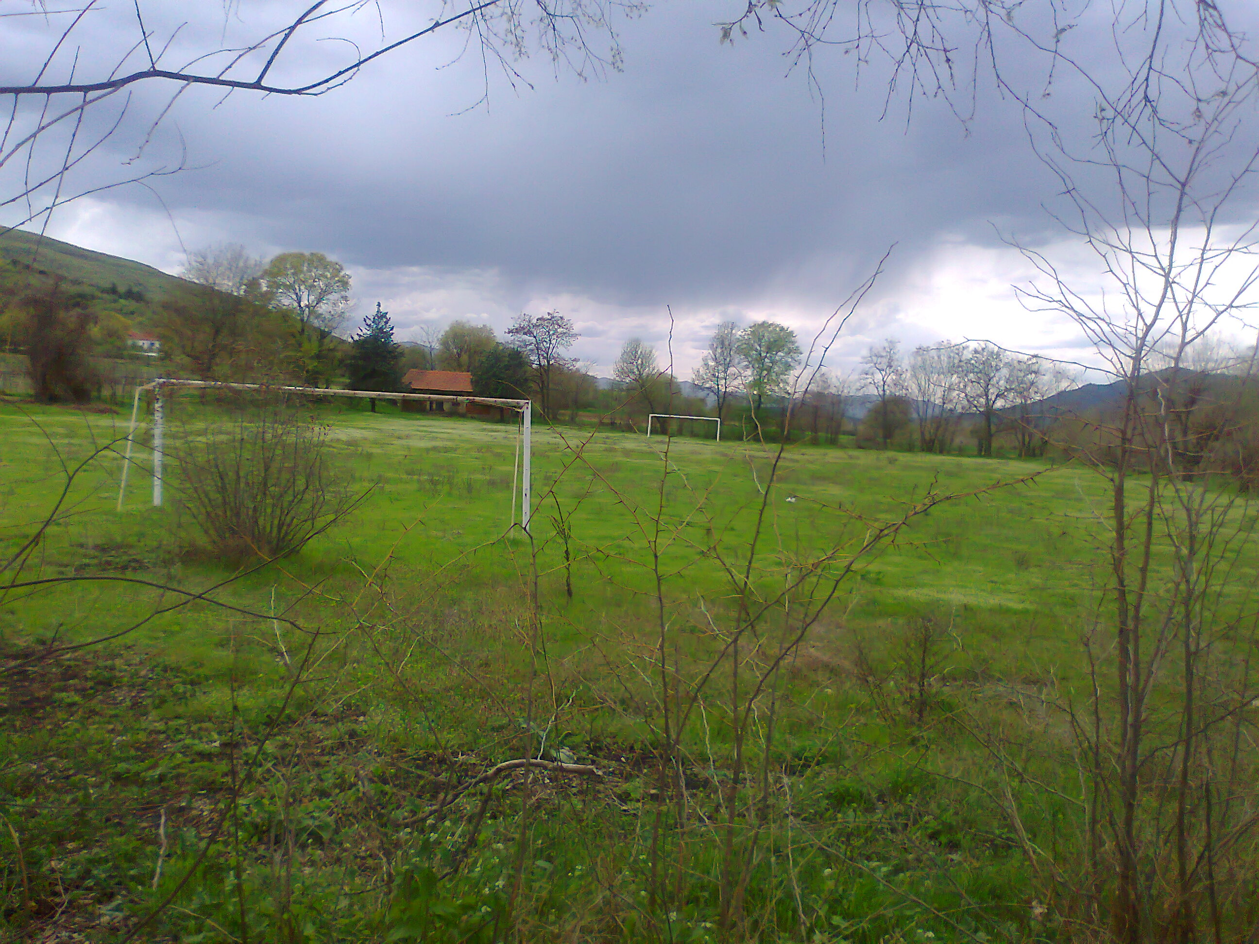 Sobri